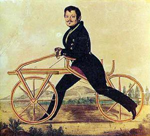 Karl Drais auf seiner Draisine.